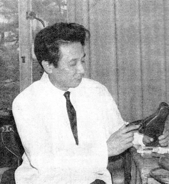 化学同人『化学 = Chemistry.』第22巻第6号（1967）より中西香爾